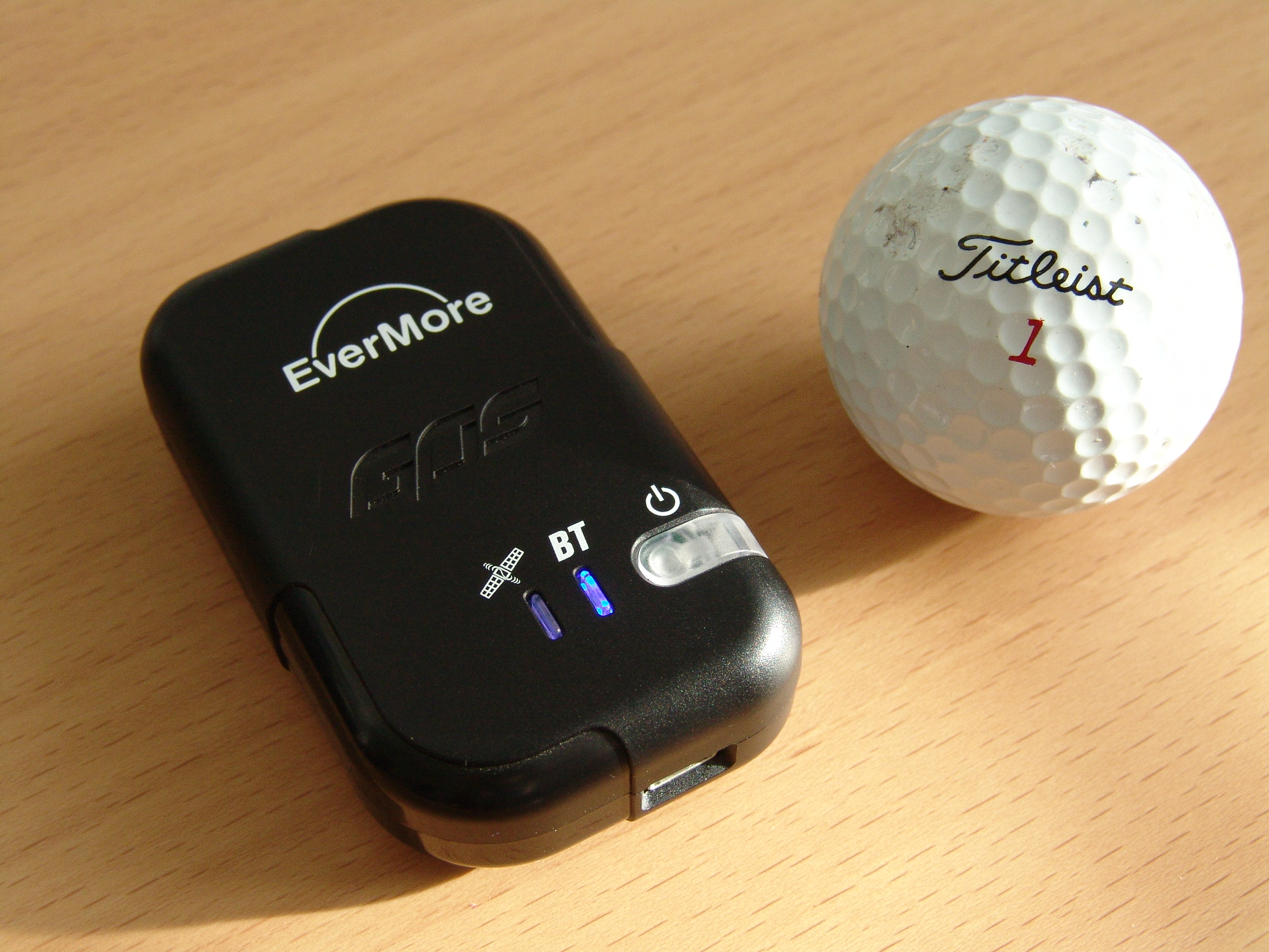 Odbiornik GPS + datalogger - rejestrator trasy EverMore GT-800-BT